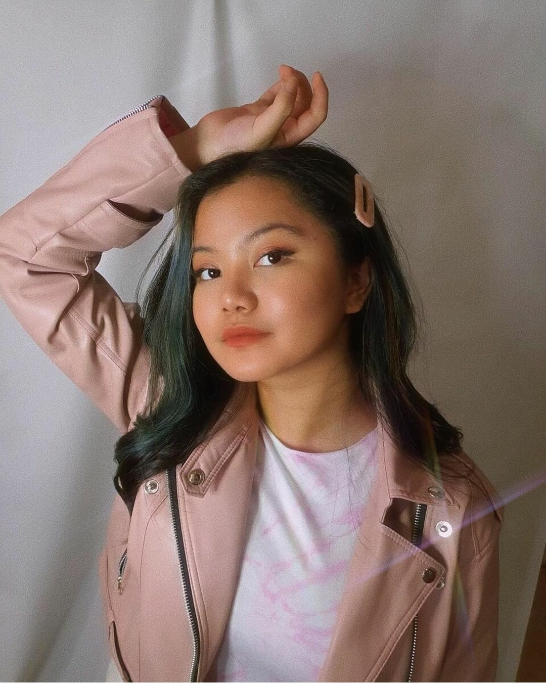 Foto terbaru Naomi Ivo